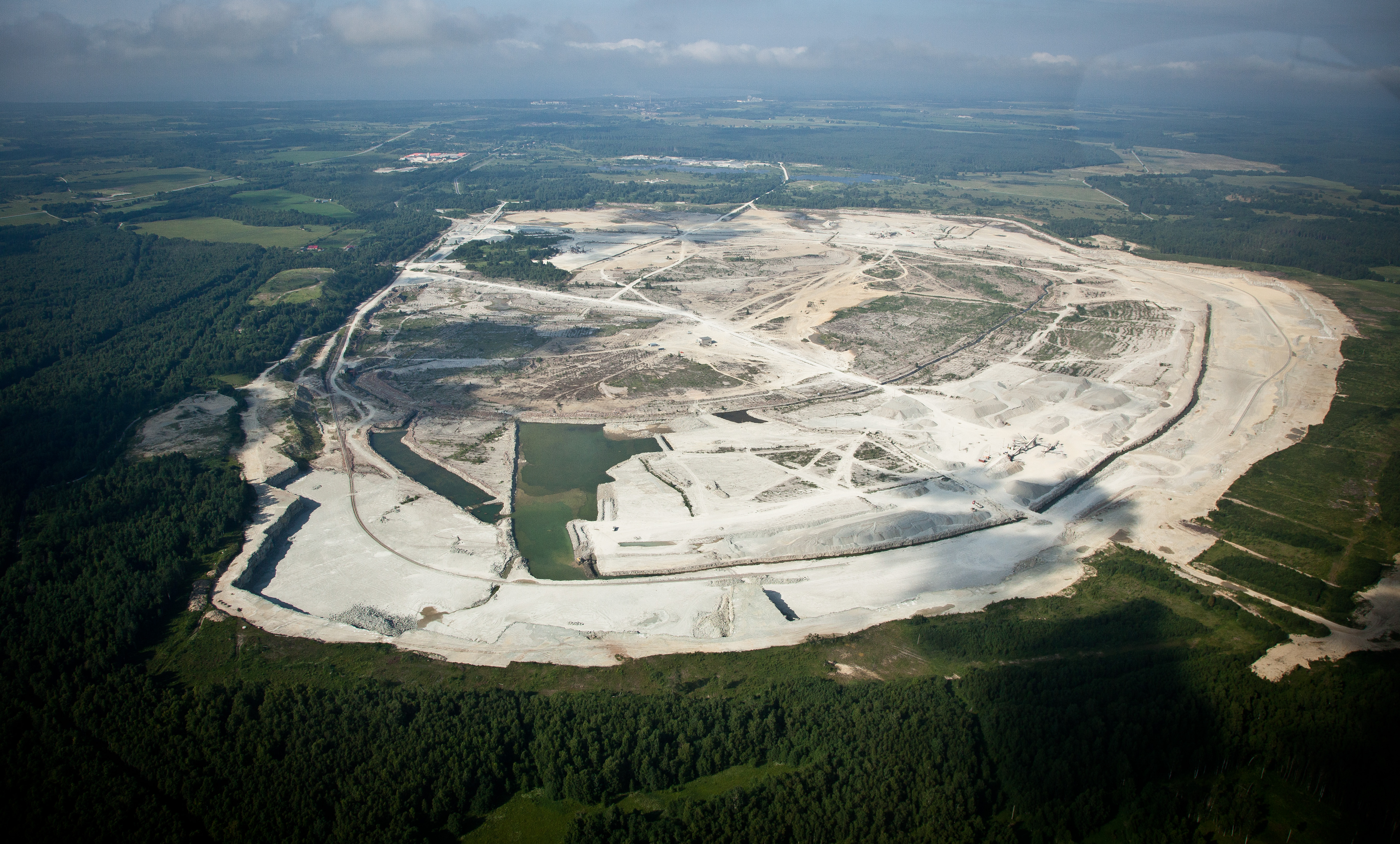 Kunda-Aru limestone quarry in Estonia.